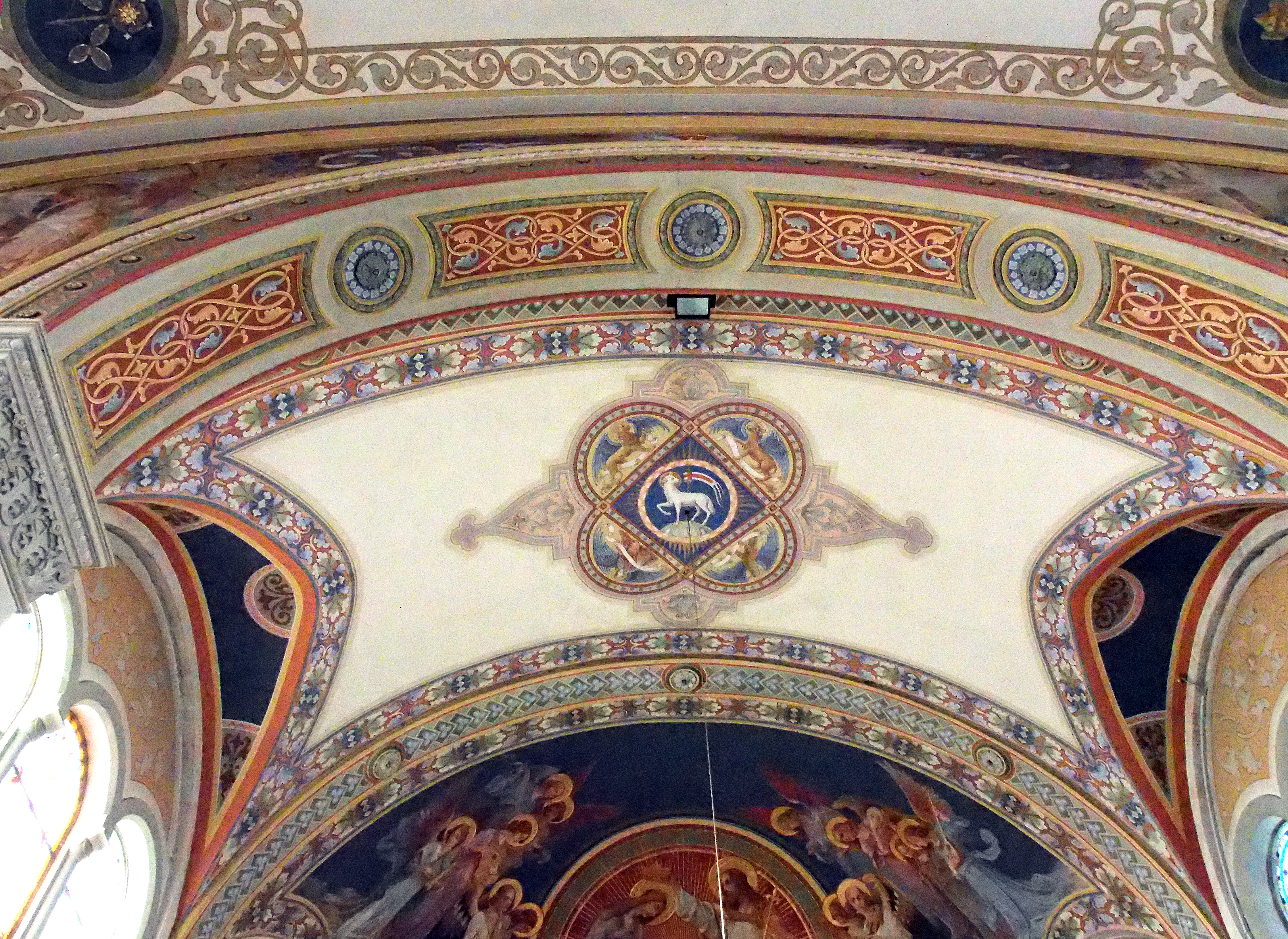 Lamm Gottes, Decke des Altarraumes der Kirche Maria Opferung (Riezlern)